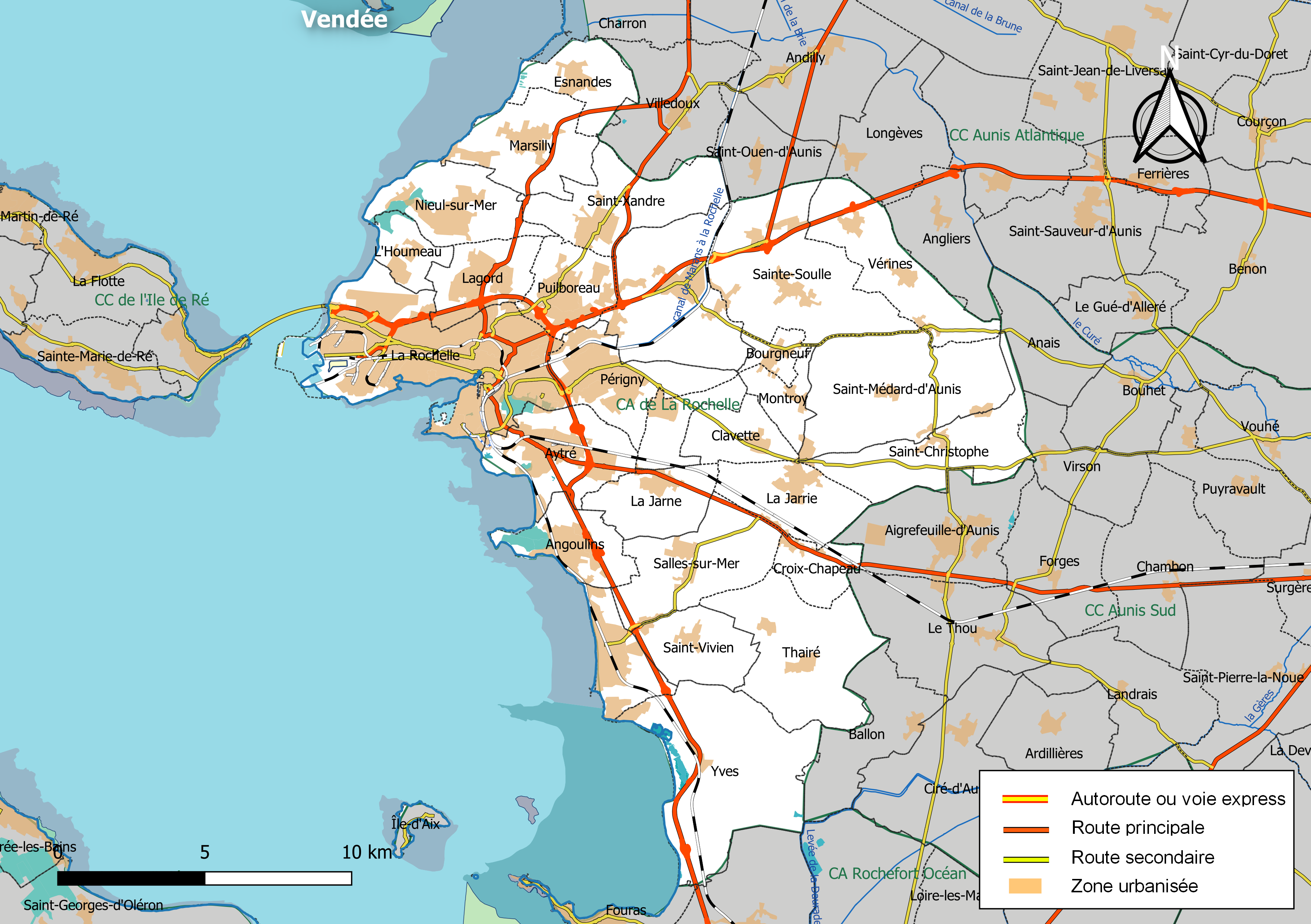 Carte géographique de la Communauté d'agglomération de La Rochelle, département de la Charente-Maritime, France. Composition au 1er janvier 2019.